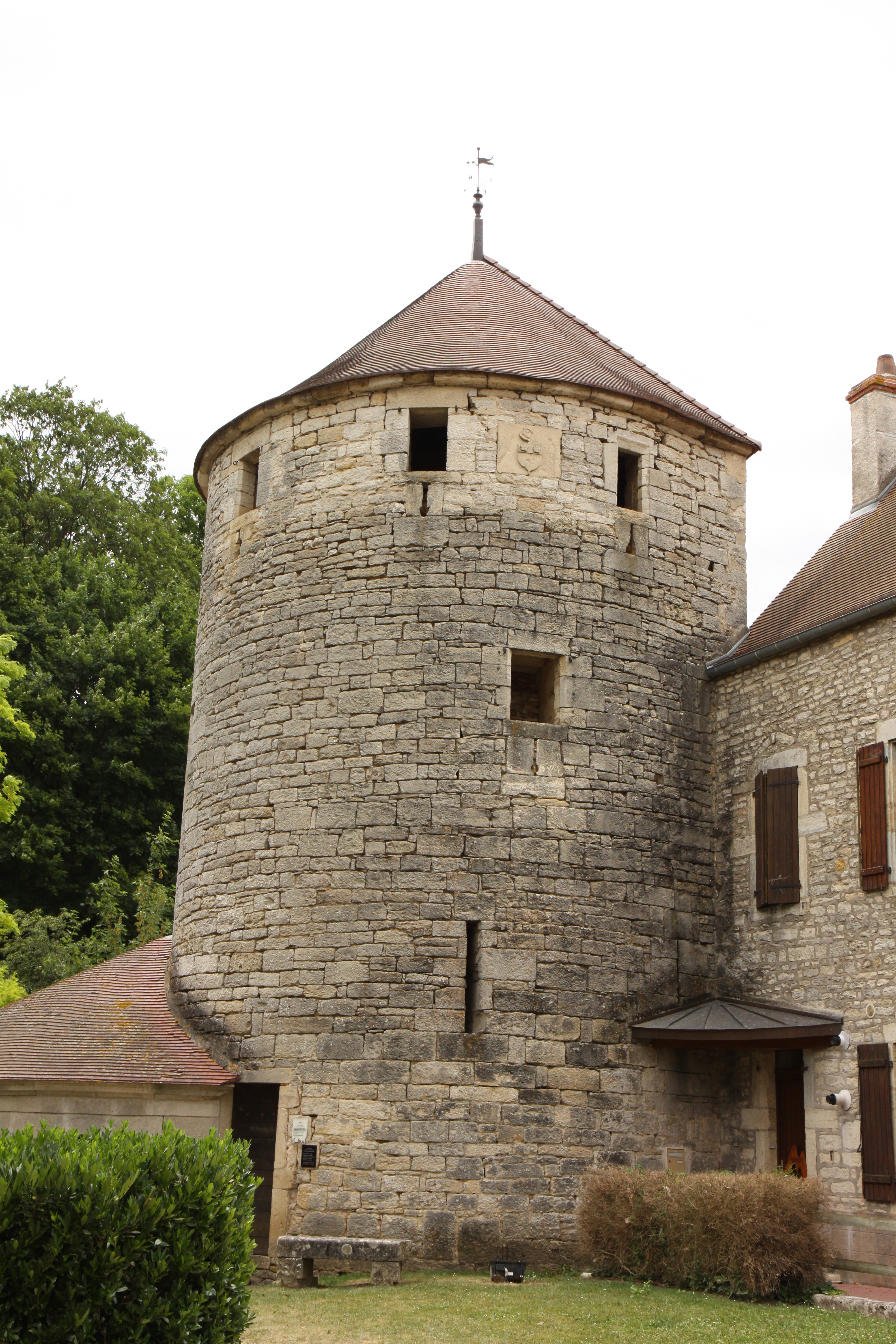 La tour d'Oysel daté de la fin du 14ème siècle à Bèze, Côte d'Or. .